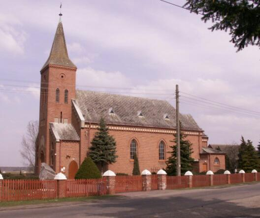 Kościół Stygmatów św. Franciszka w Szumie